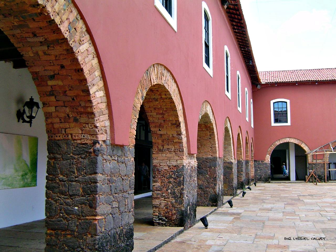 O Convento das Mercês,situado na Praia Grande, é uma grandiosa obra da arquitetura religiosa mercedária inaugurada em 1654 pelo Padre Antônio Vieira. O Convento abriga a Fundação da Memória Republicana, o Memorial José Sarney, o Centro Modelador de Pesquisa da História Republicana e o Instituto da Amizade dos Povos de Língua Portuguesa.